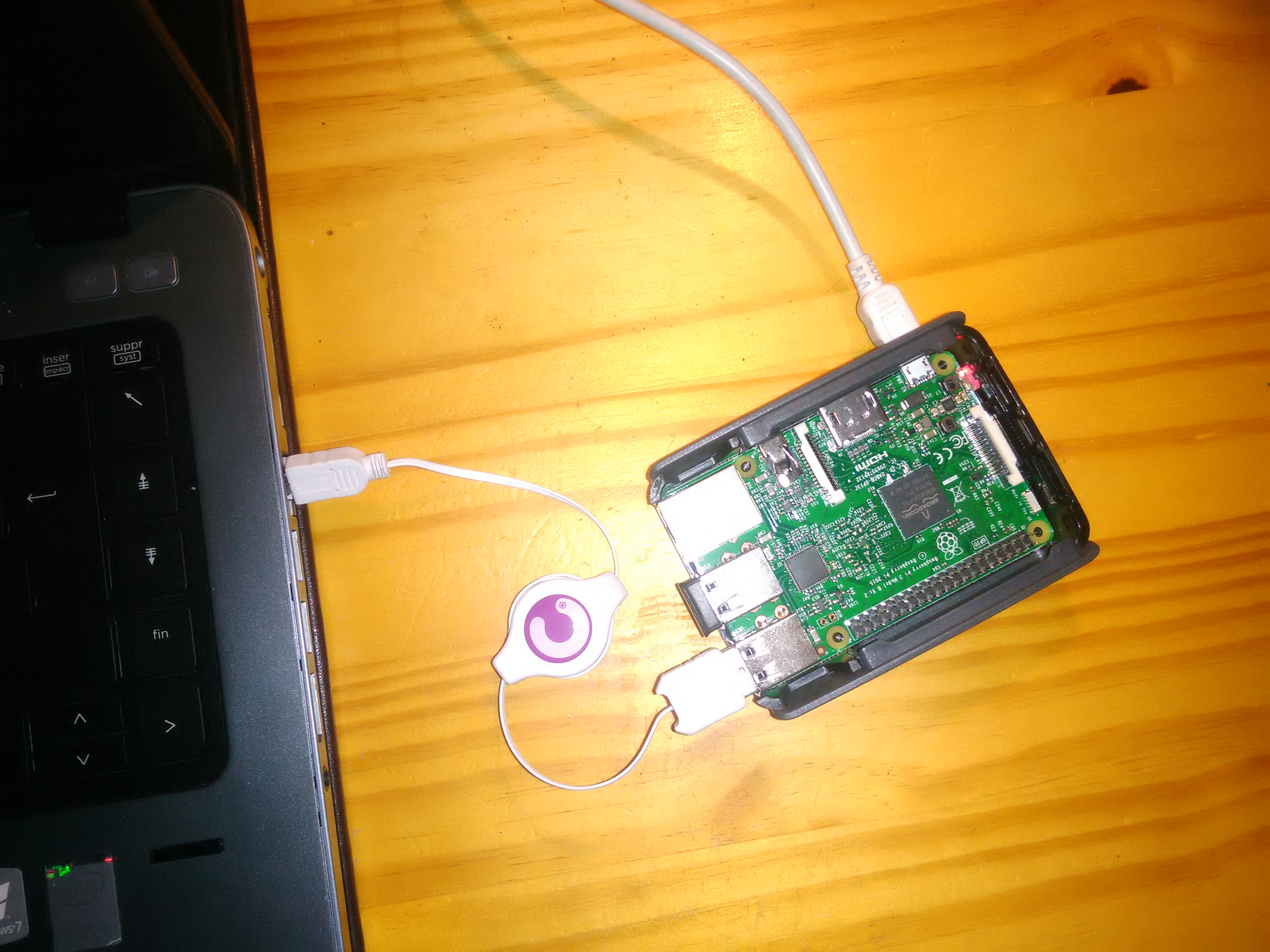 Poison Tap